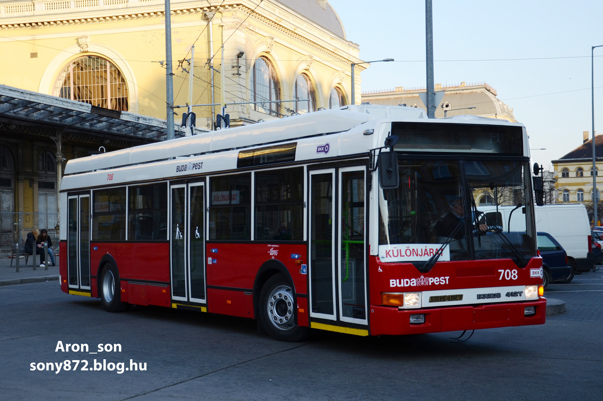 Ikarus 412.81-es trolibusz a Keleti pályaudvarnál (psz. 708)